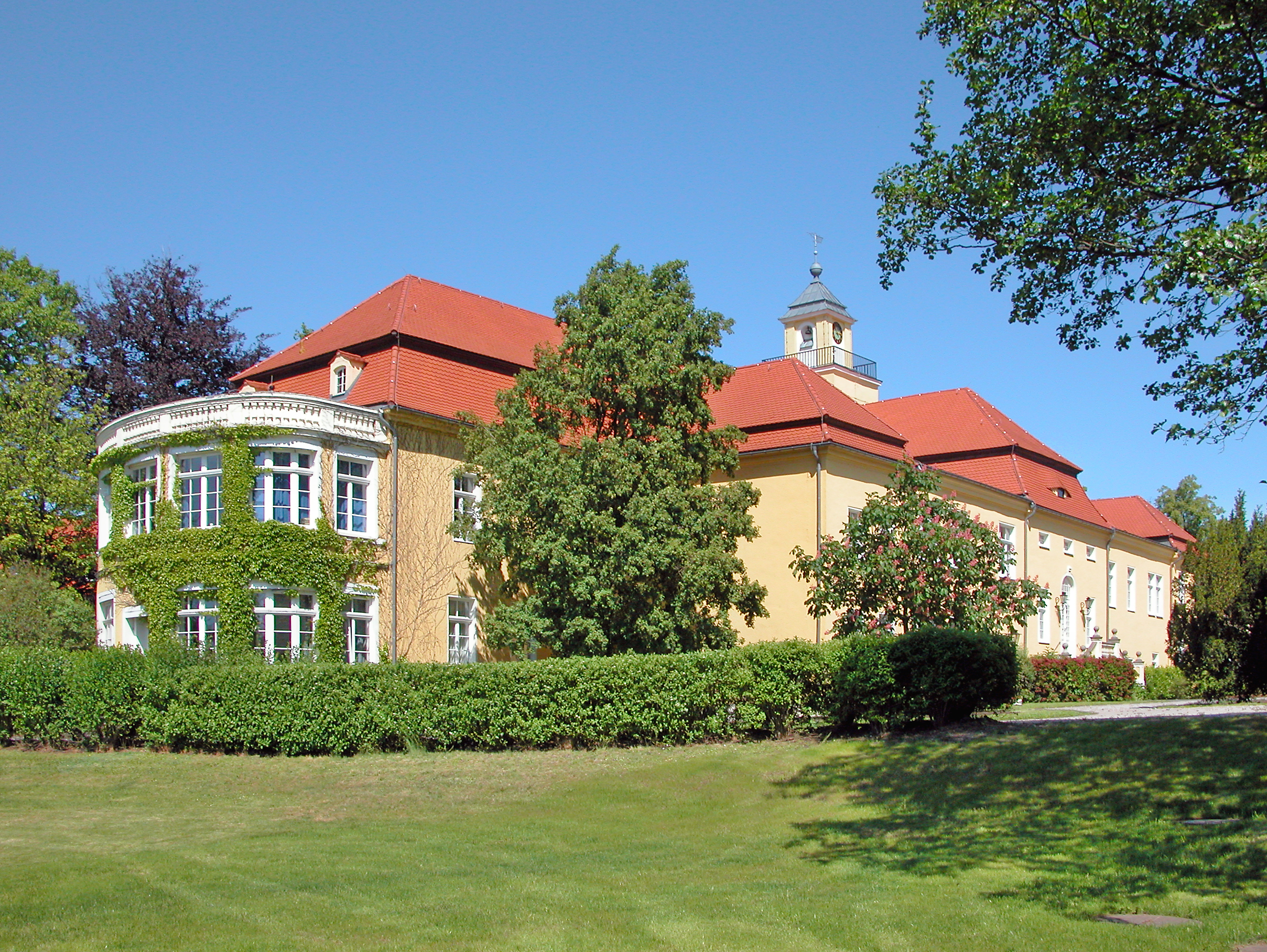 Neues Schloß, bis 1718 unter Johann George von Maxen erbaut. In der DDR dient das Schloss als Krankenhaus. Heute betreibt HELIOS-Gruppe die Rehabilitationsklinik. Sicht von Südosten. [DSCN8014.TIF]20070518215DR.JPG(c)Blobelt